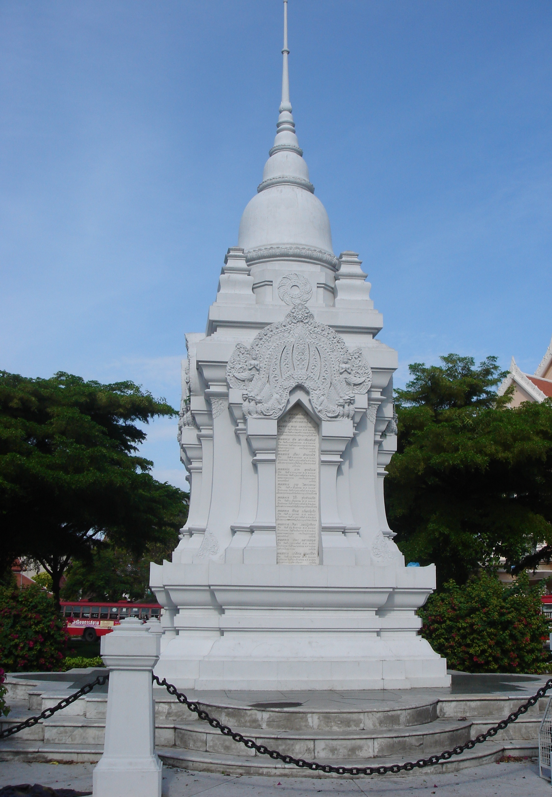 Monument aux morts 14/18 à Bangkok